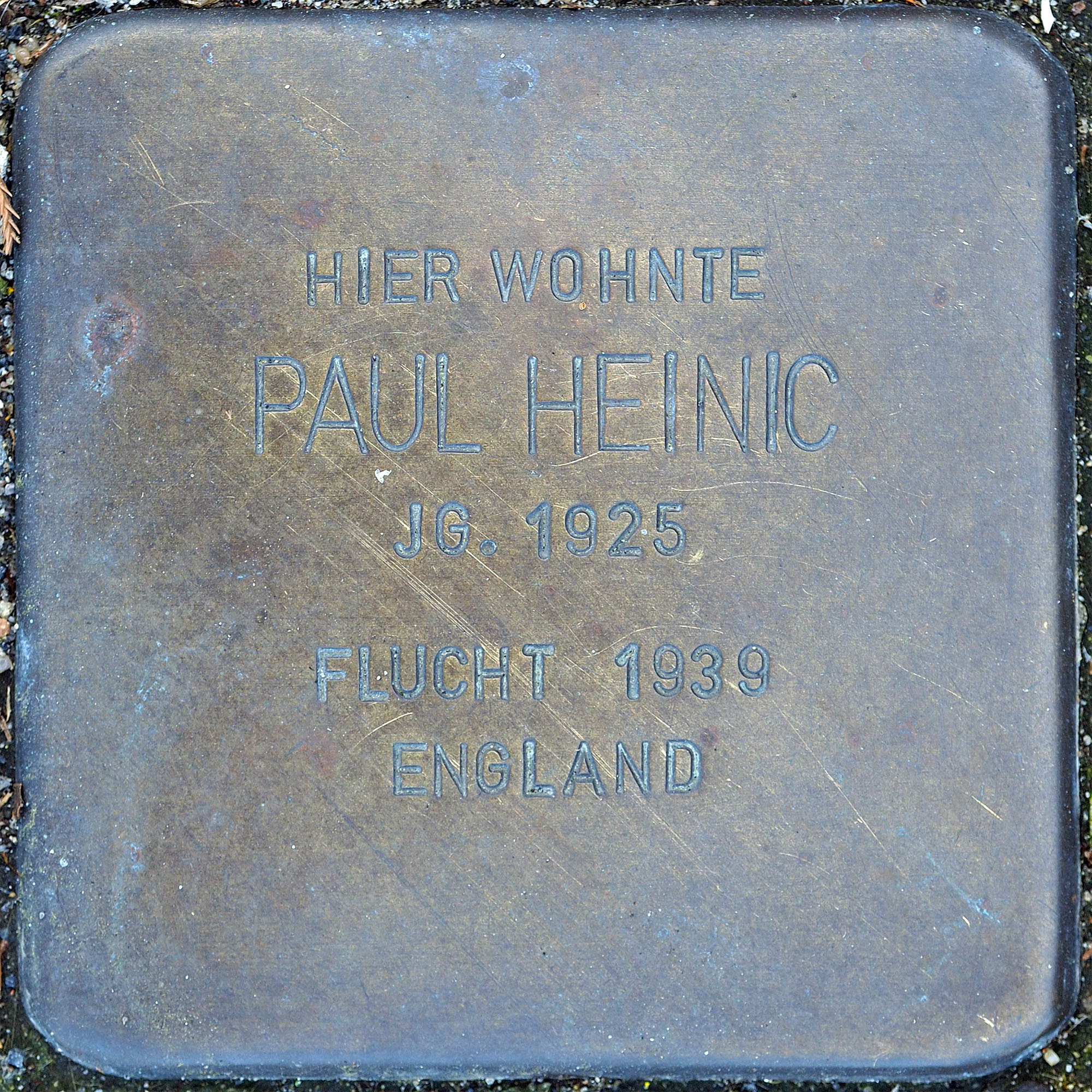 Stolpersteine MG: Heinic, Paul